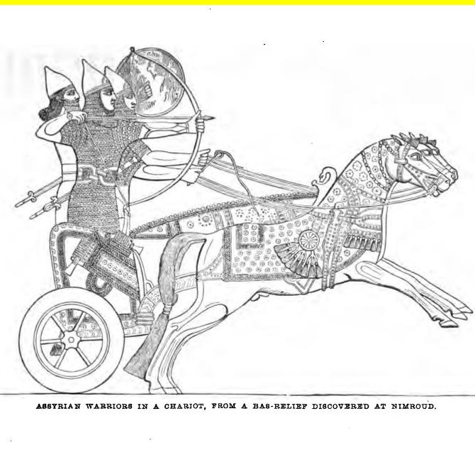 Assyrische Krieger mit Pfeil und Bogen auf Streitwagen - Zeichnung eines Flachreliefs, das von Layard in Nimrud ausgegraben wurde